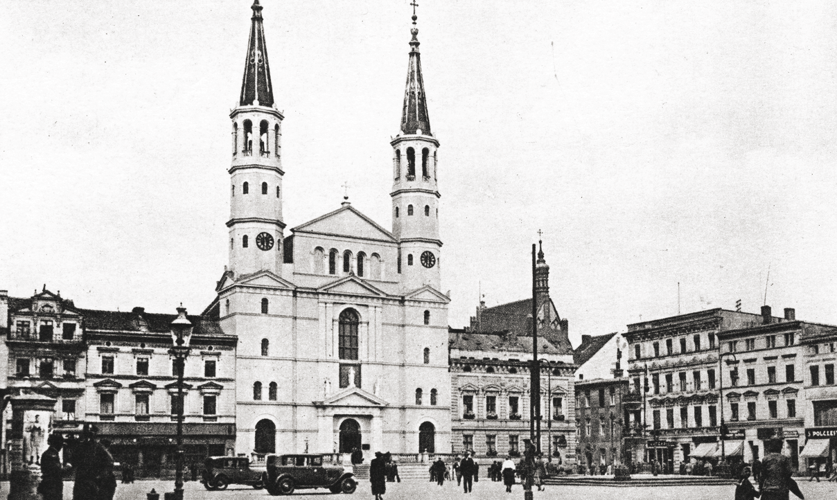 Stary Rynek im. marszałka Józefa Piłsudskiego w Bydgoszczy (1929-1935)